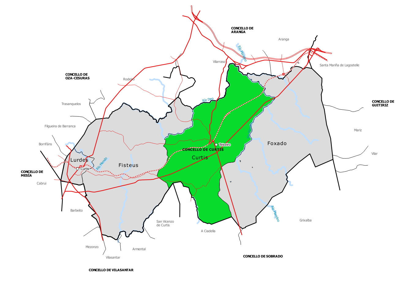 Mapa da parroquia de Curtis no concello de Curtis.